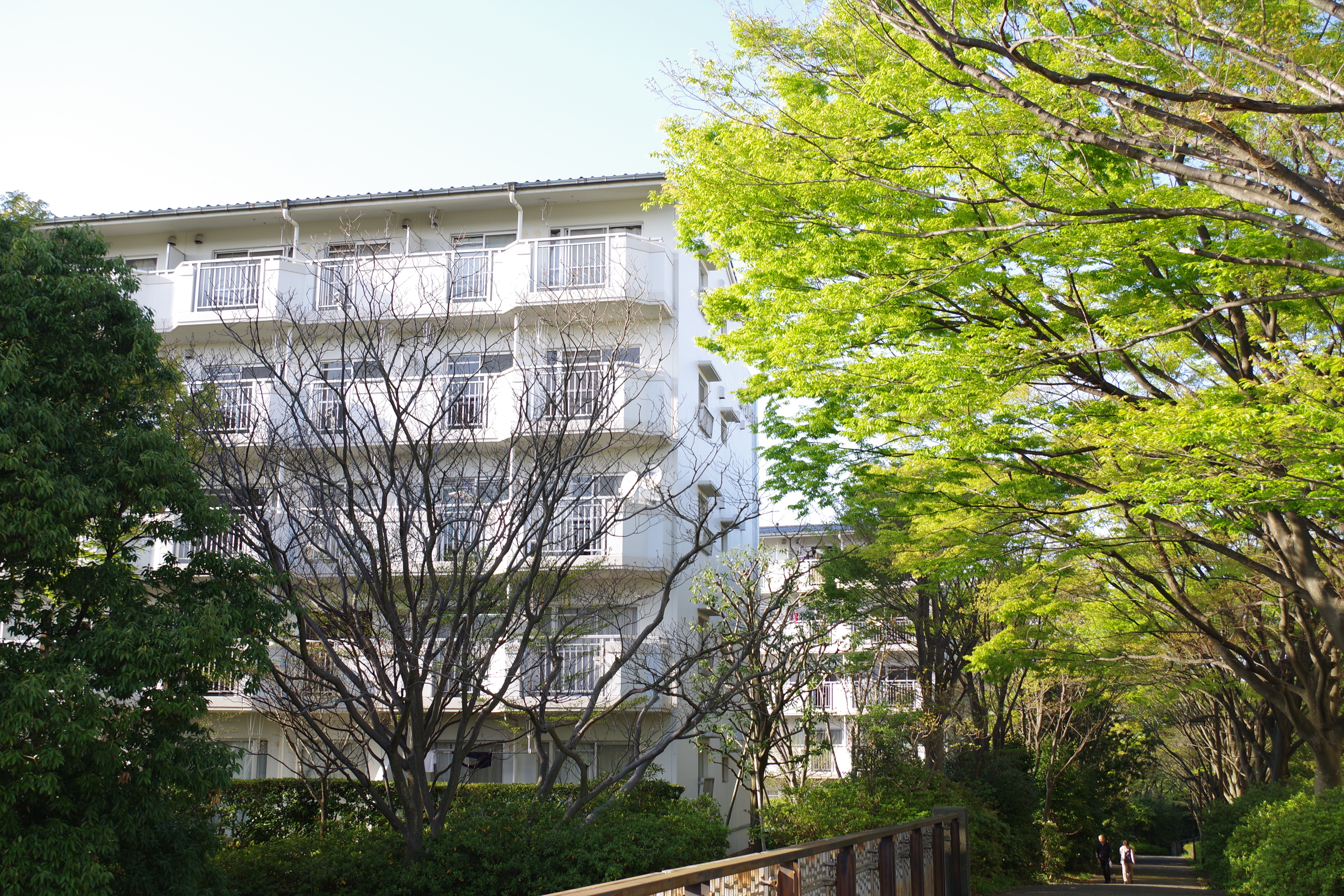 多摩ニュータウンのUR賃貸住宅「メゾン聖ヶ丘」160415